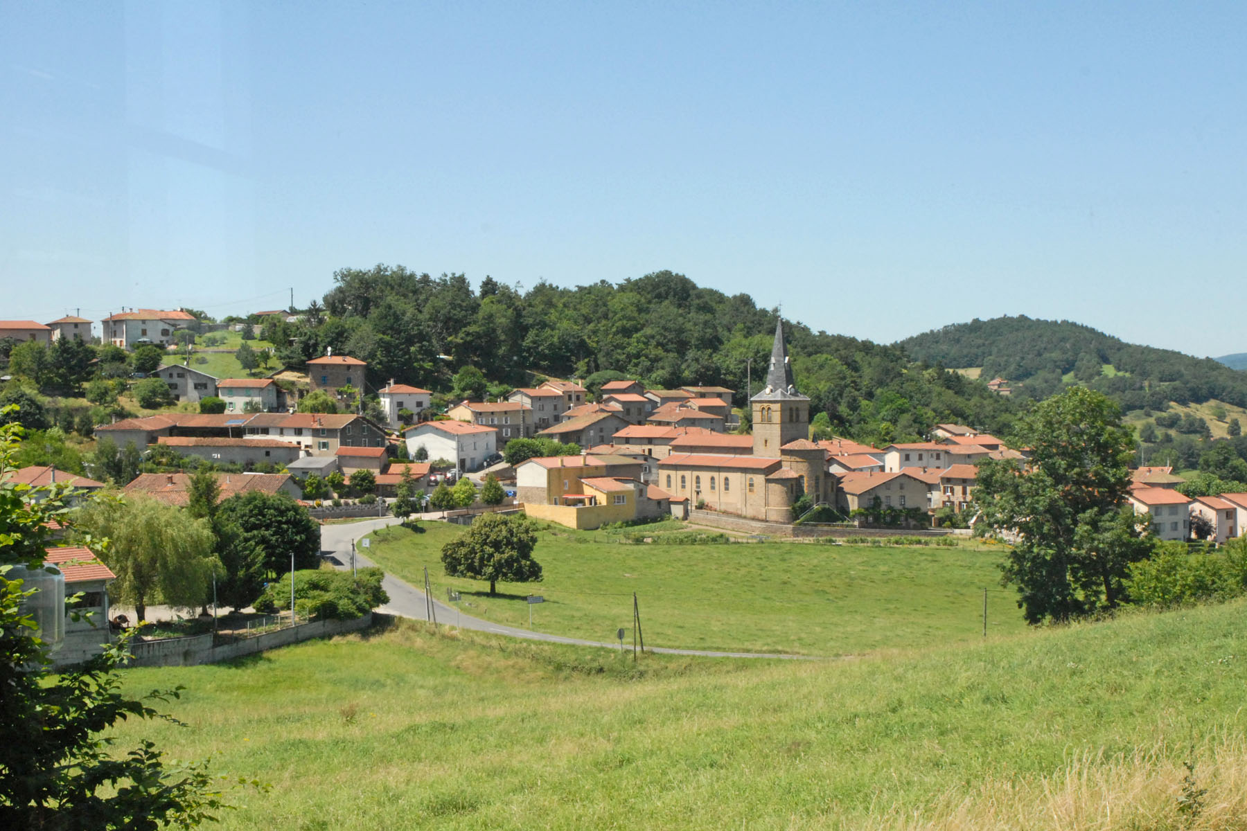 L'environnement du Centre multimédia Erasme